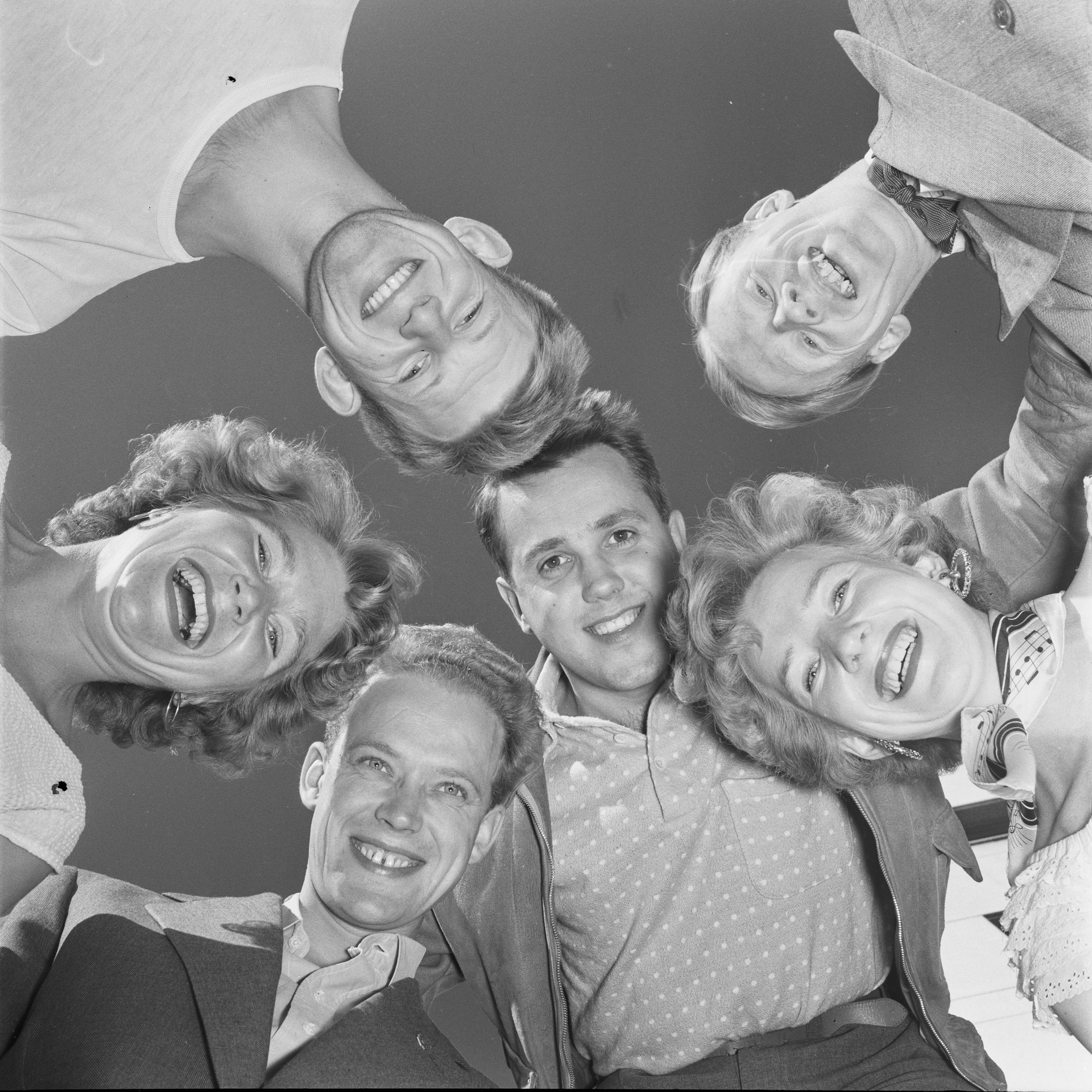 Bildet er hentet fra Arkivverket. The Monnkeys. NÅ nr. 18, 1954 Arkivinstitusjon : Riksarkivet Arkivnavn : Billedbladet NÅ Sted : Norge, Ukjent, Ukjent, Ukjent Emneord: Musikkgrupper, Band Avbildet